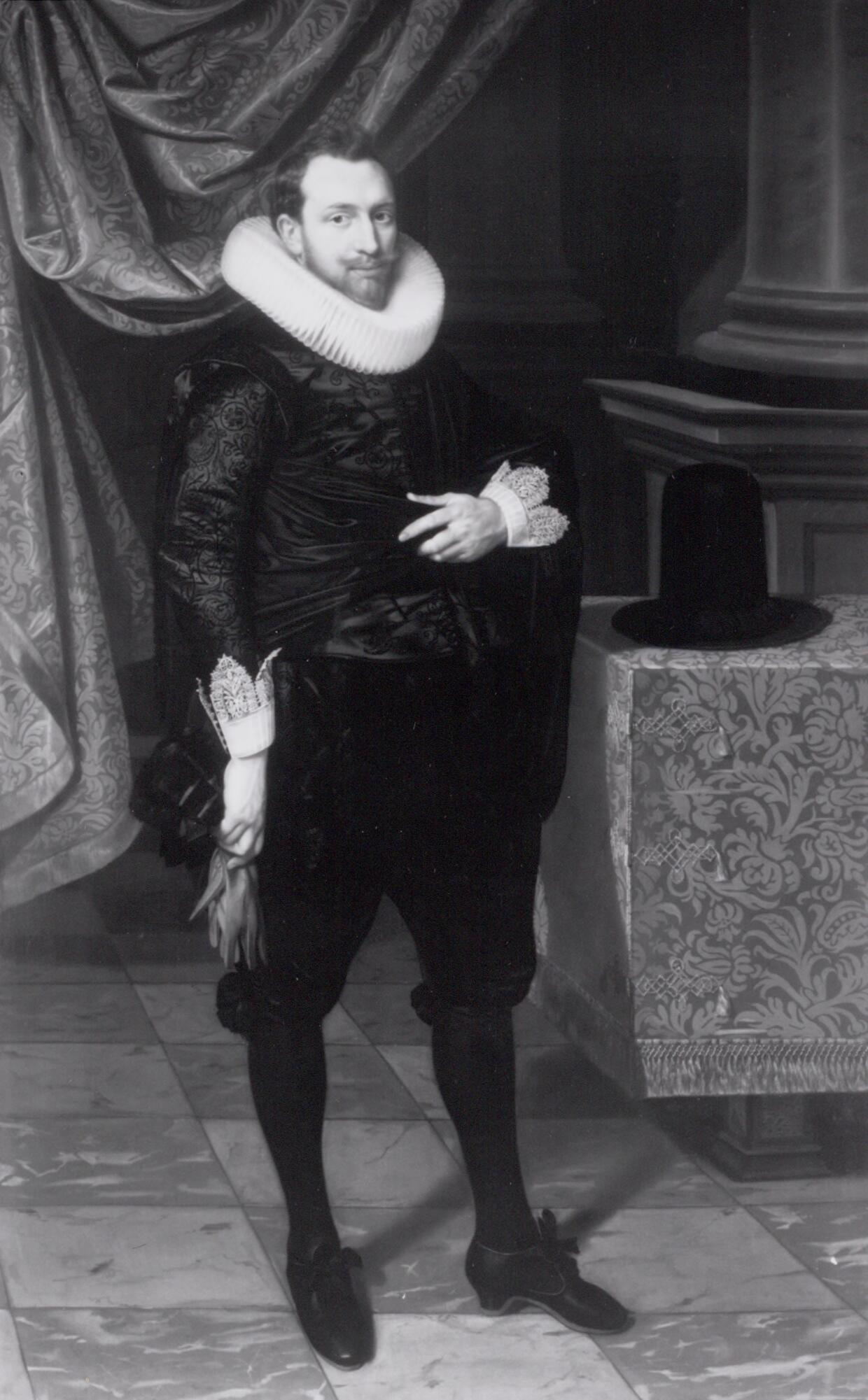 Cornelis Bicker van Swieten (1592-1654), Heer van Swieten, war ein Politiker Hollands und Amsterdams